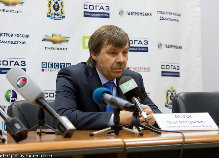 Олег Знарок на пресс-конференции после матча КХЛ «Амур» — «Динамо» (Москва) 1 ноября 2011 года